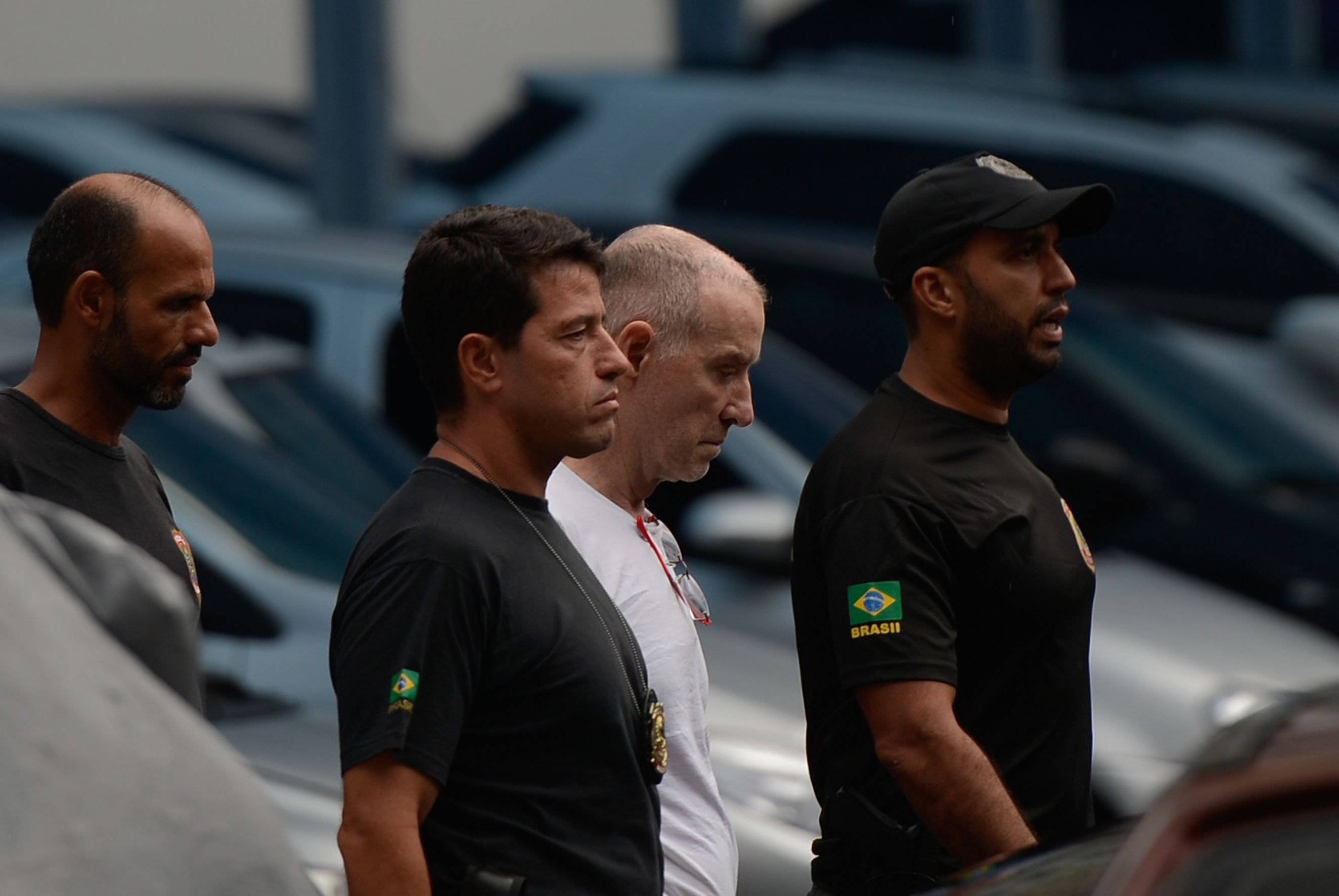 Rio de Janeiro - Empresário Eike Batista deixa a sede da PF, na região portuária do Rio, após depoimento na Delegacia de Combate ao Crime Organizado e Desvio de Recursos.